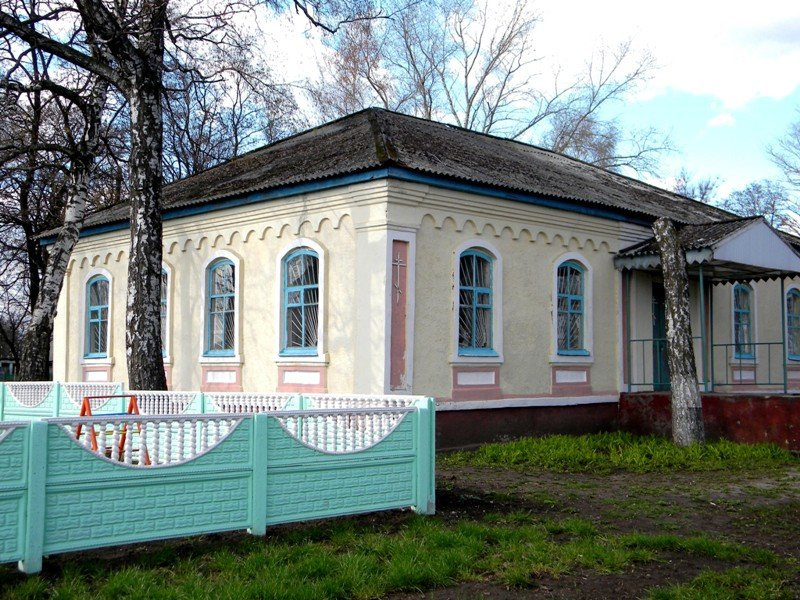 Церковь в с. Кощеево, Корочанский район Белгородской области, РФ